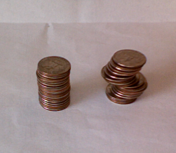 cavalieri, cavalieri's principle, geometry, volume